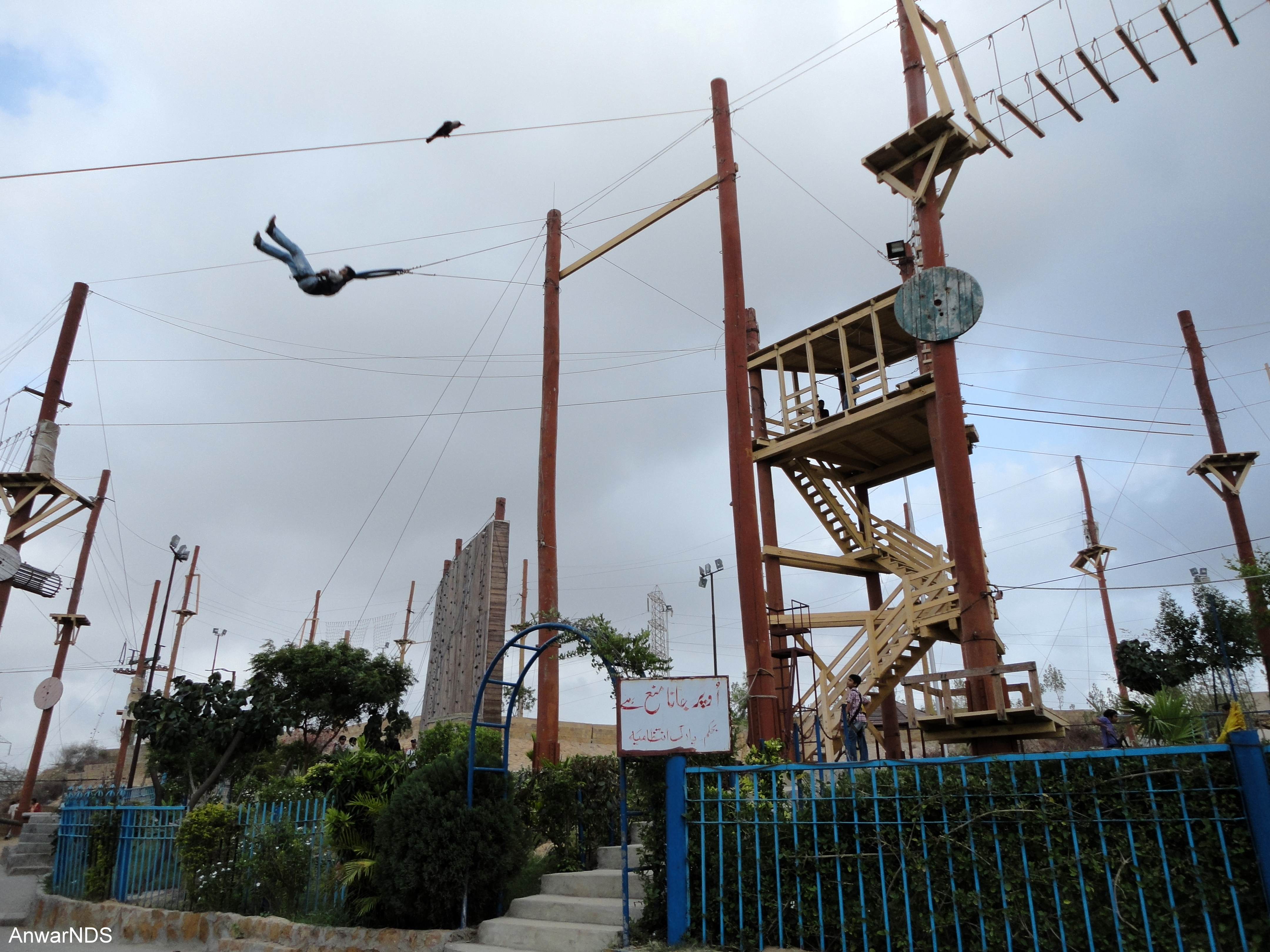 Safari Park Karachi 24